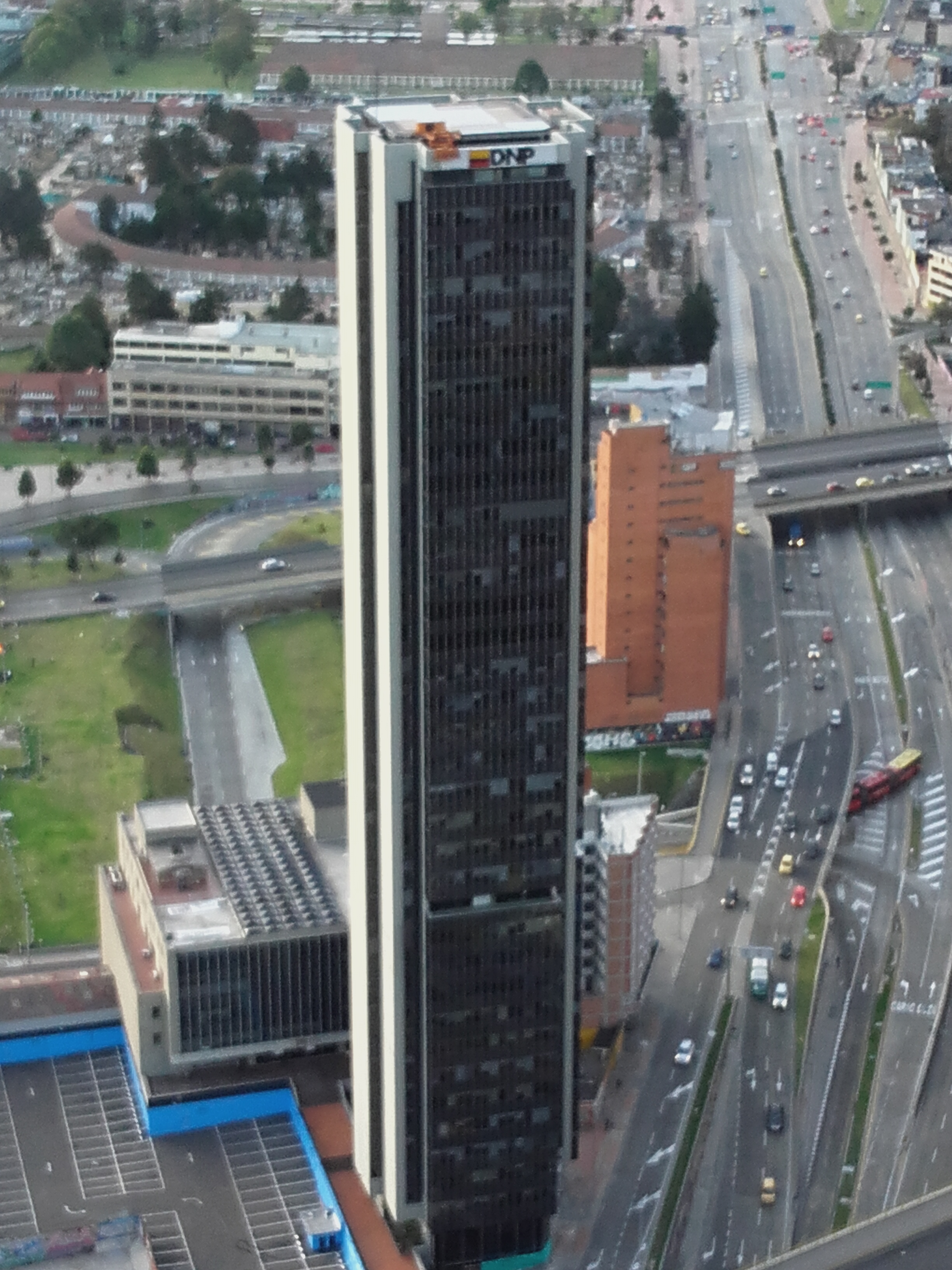 xnxnxnxncncncncncncncn